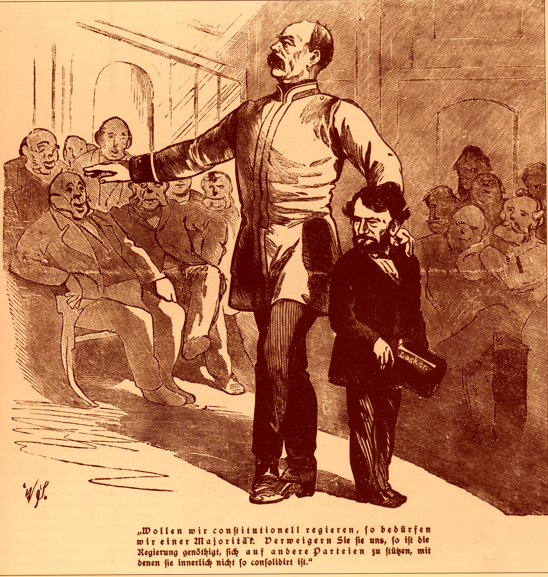 Бисмарк и Ласкер в парламенте.